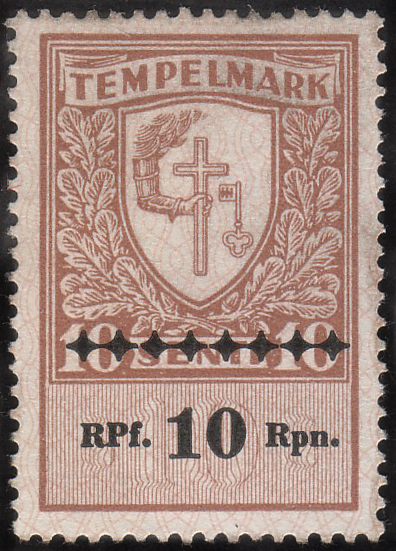 Фискальная марка Эстонии периода немецкой оккупации